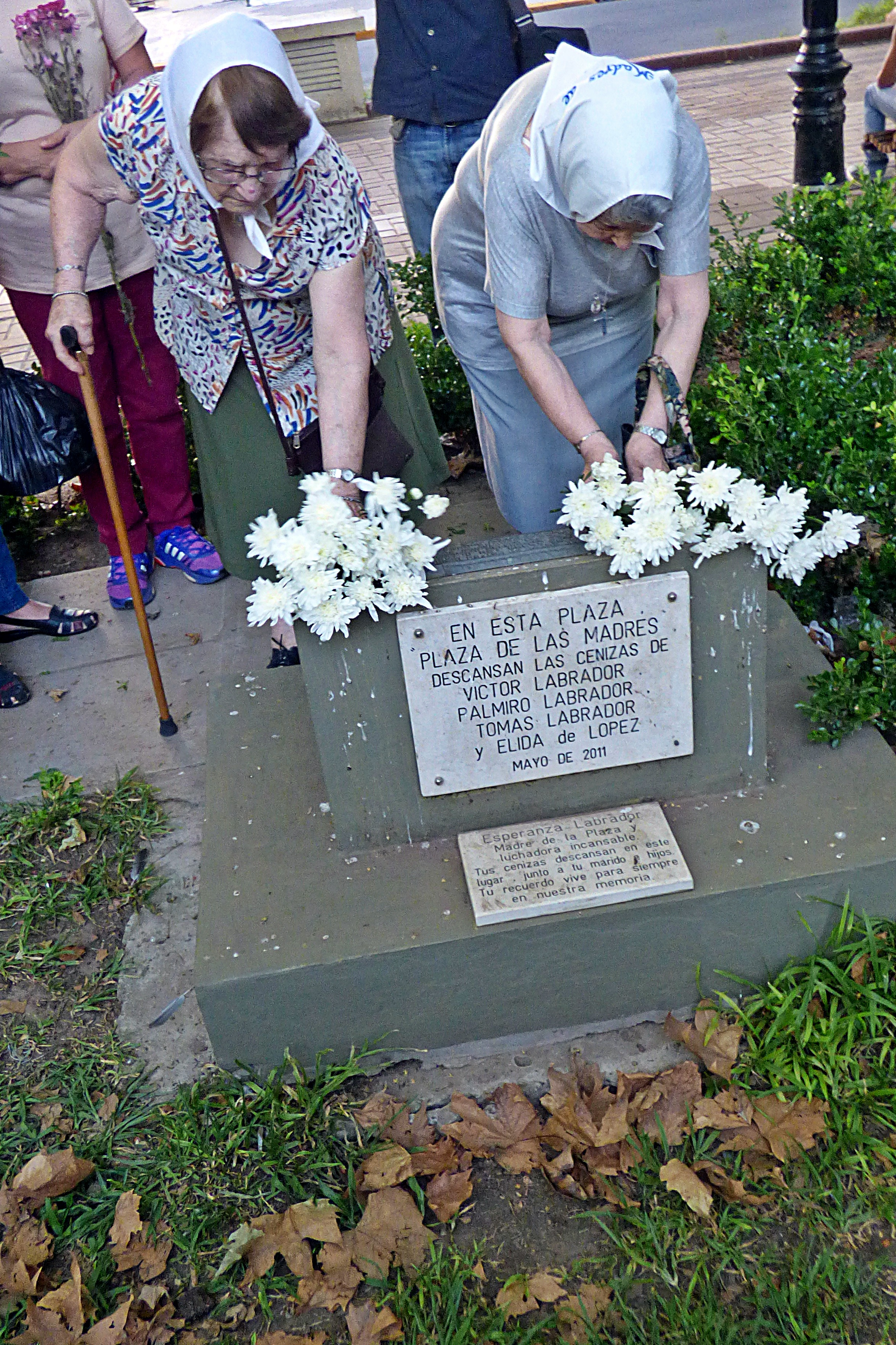 Chiche Massa y Norma Vermeulen en homenaje a Esperanza